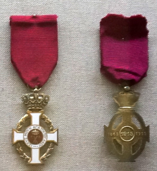 visible au musée.